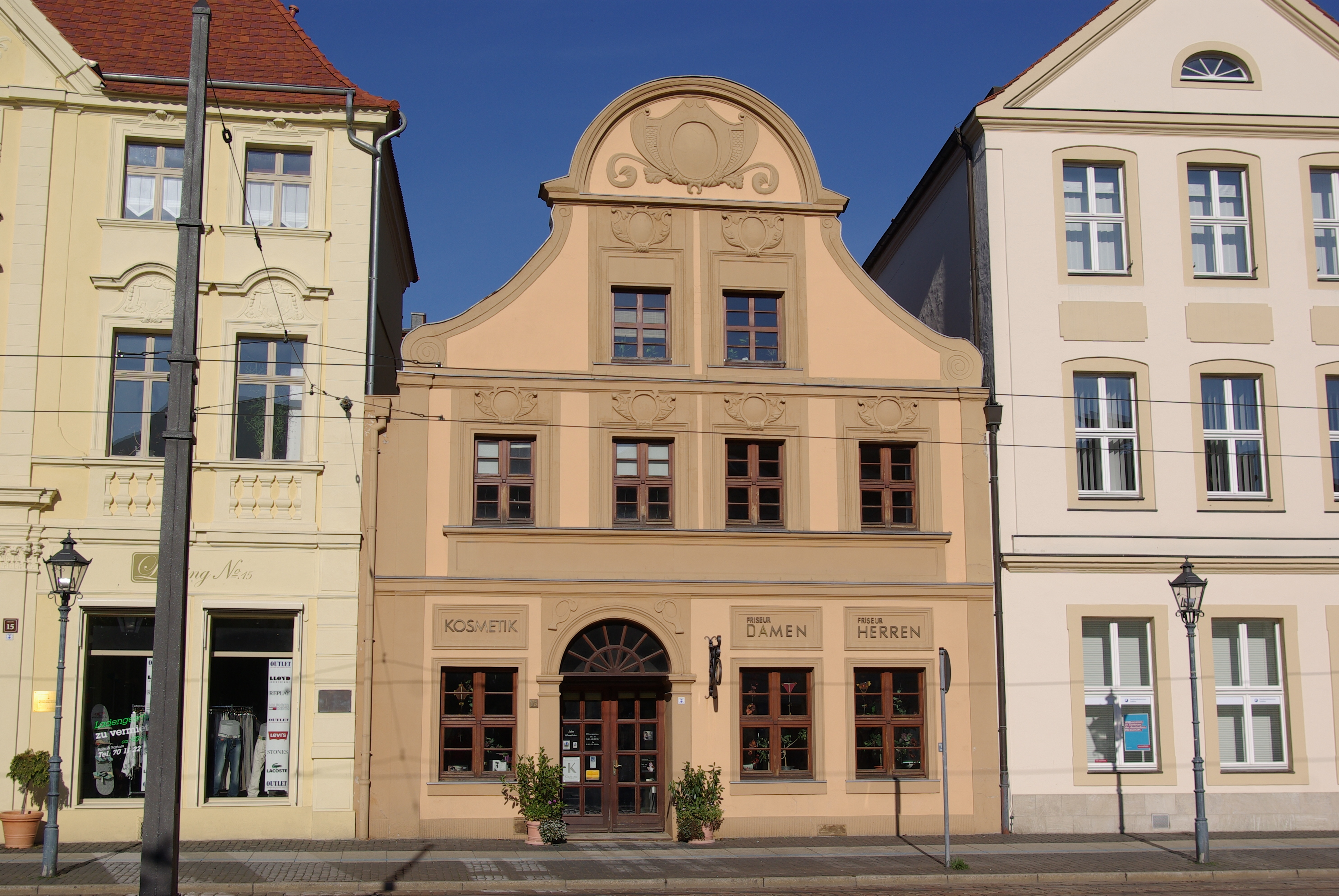 Cottbus in Brandenburg. Das Haus Altmarkt 16 steht unter Denkmalschutz.